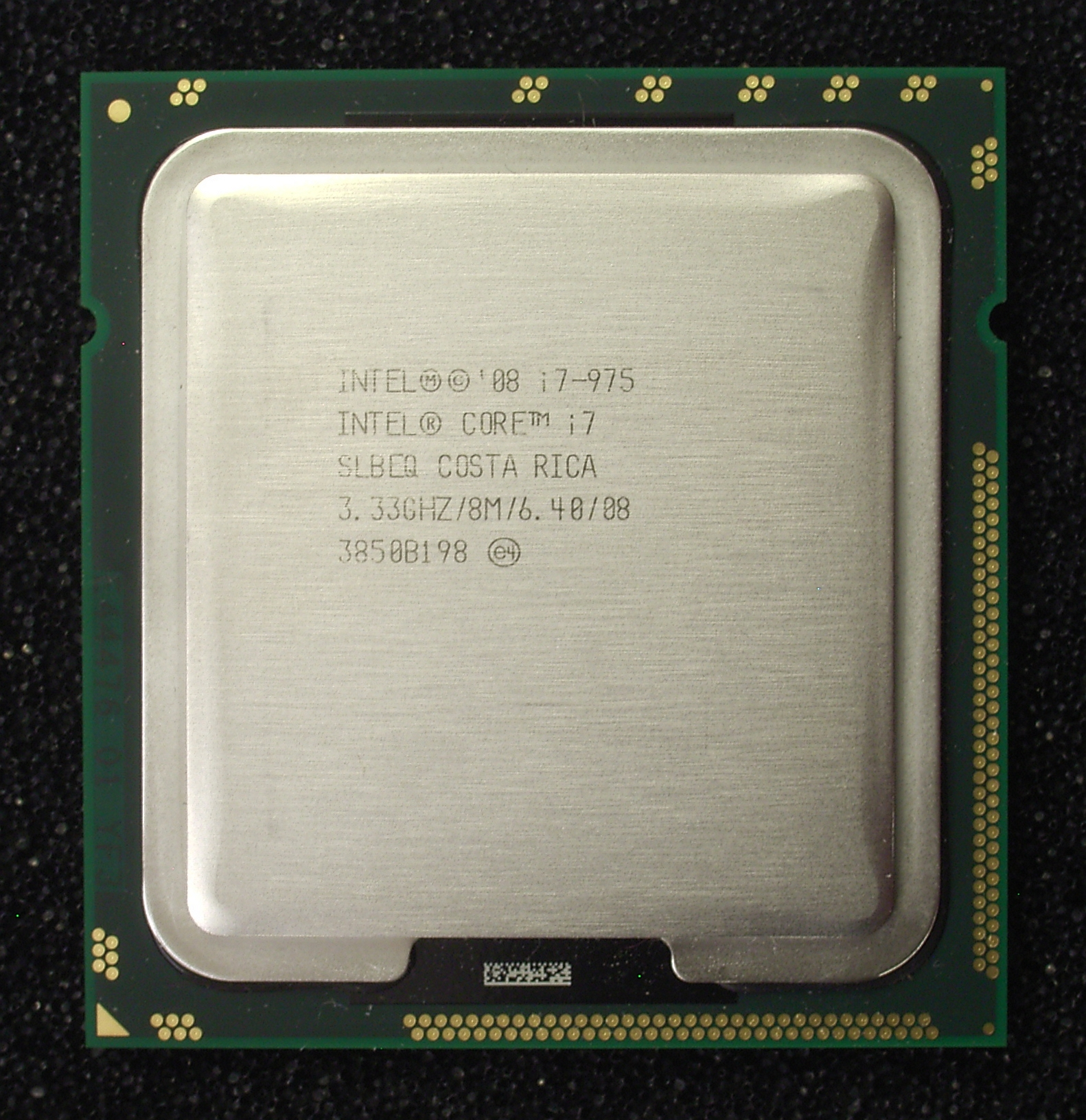 Intel core i7-975 Prozessor, LGA1366, Ansicht von oben auf den Heatspreader